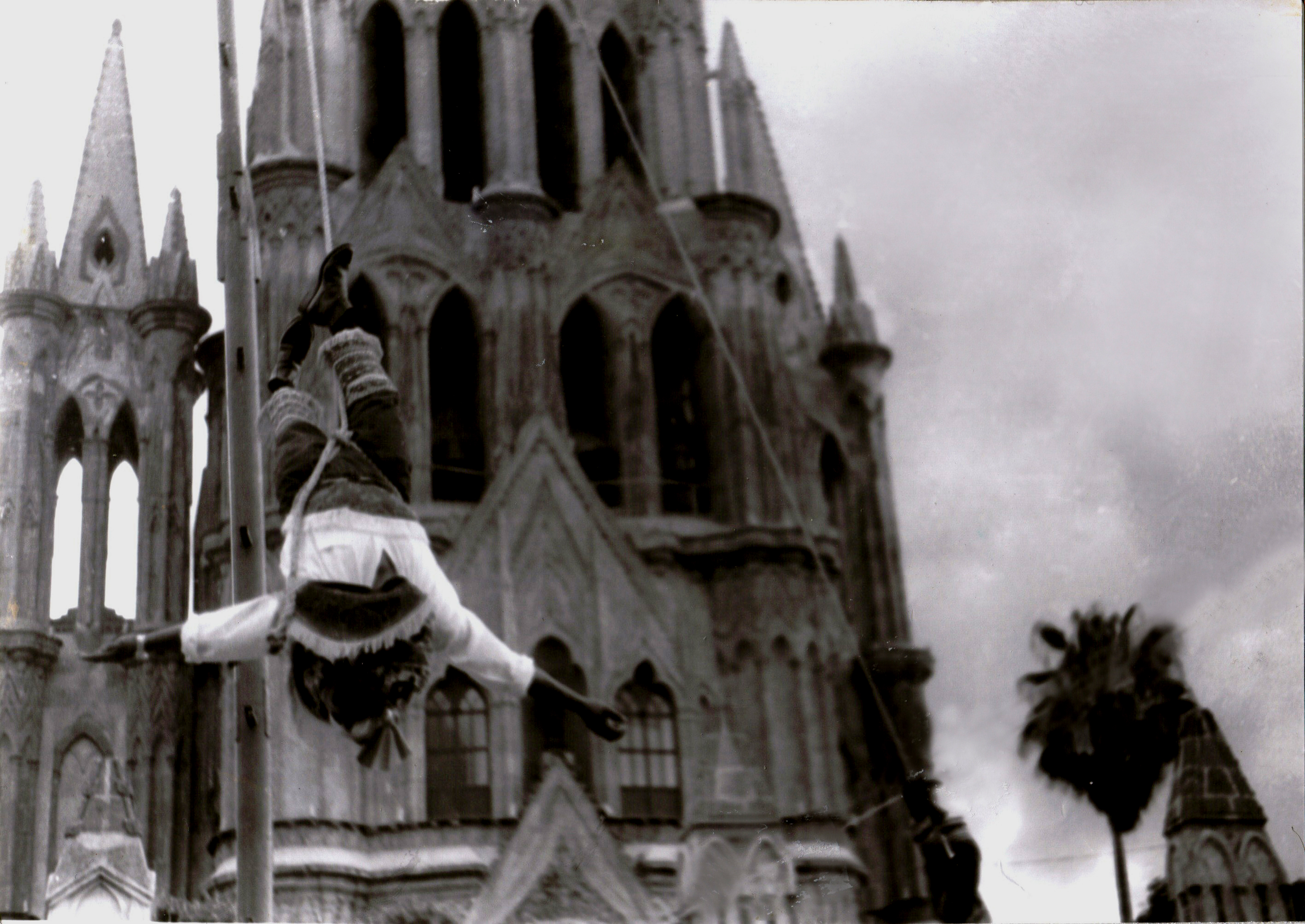 Volador de Papantla frente a la parroquia de San Miguel De Allende, Guanajuato; México.